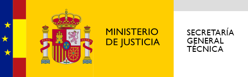 Logotipo de la Secretaría General Técnica del Ministerio de Justicia de España